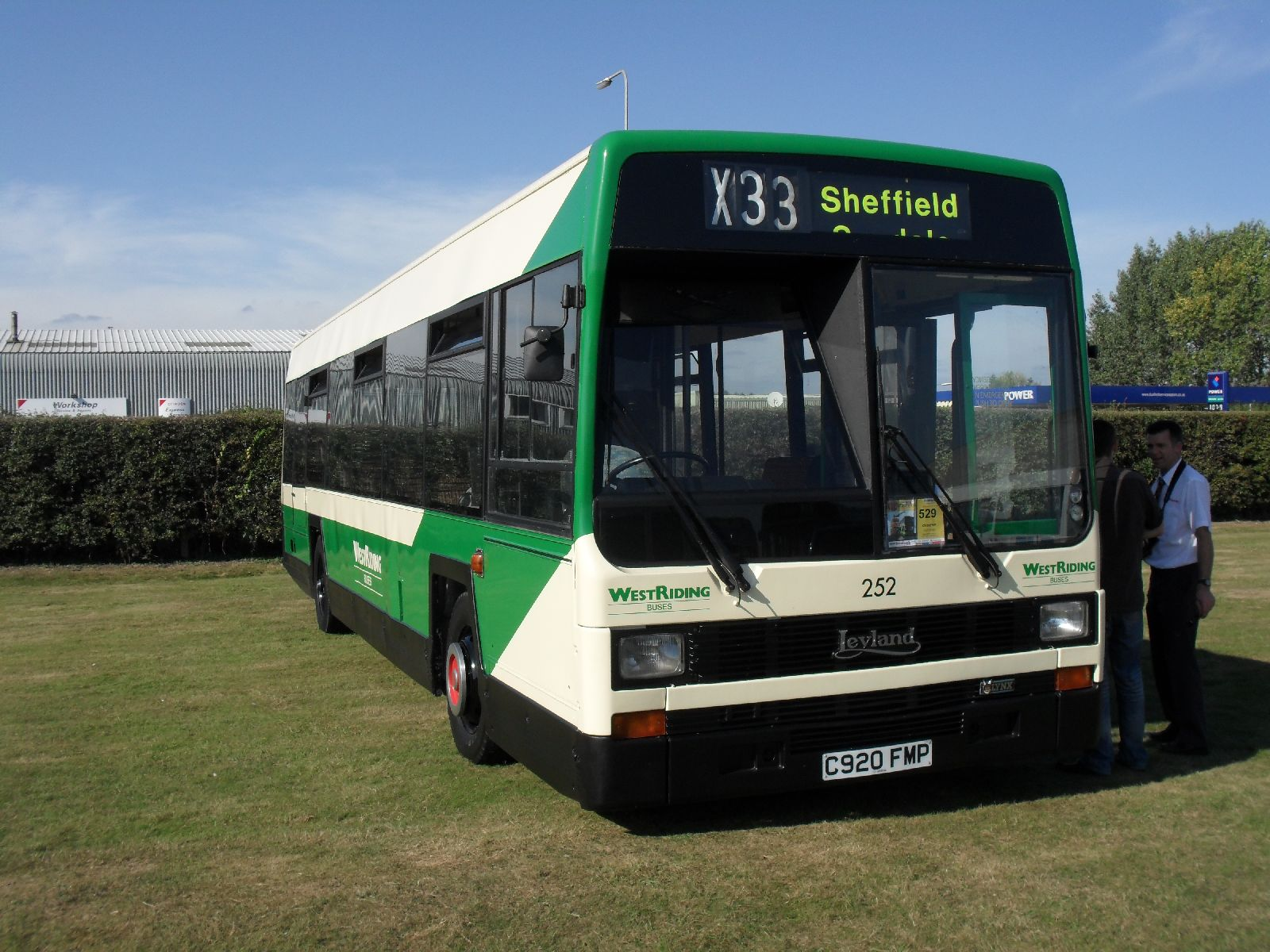 C920FMP